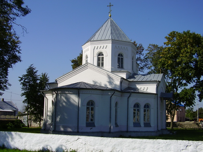 Лунна. Царква